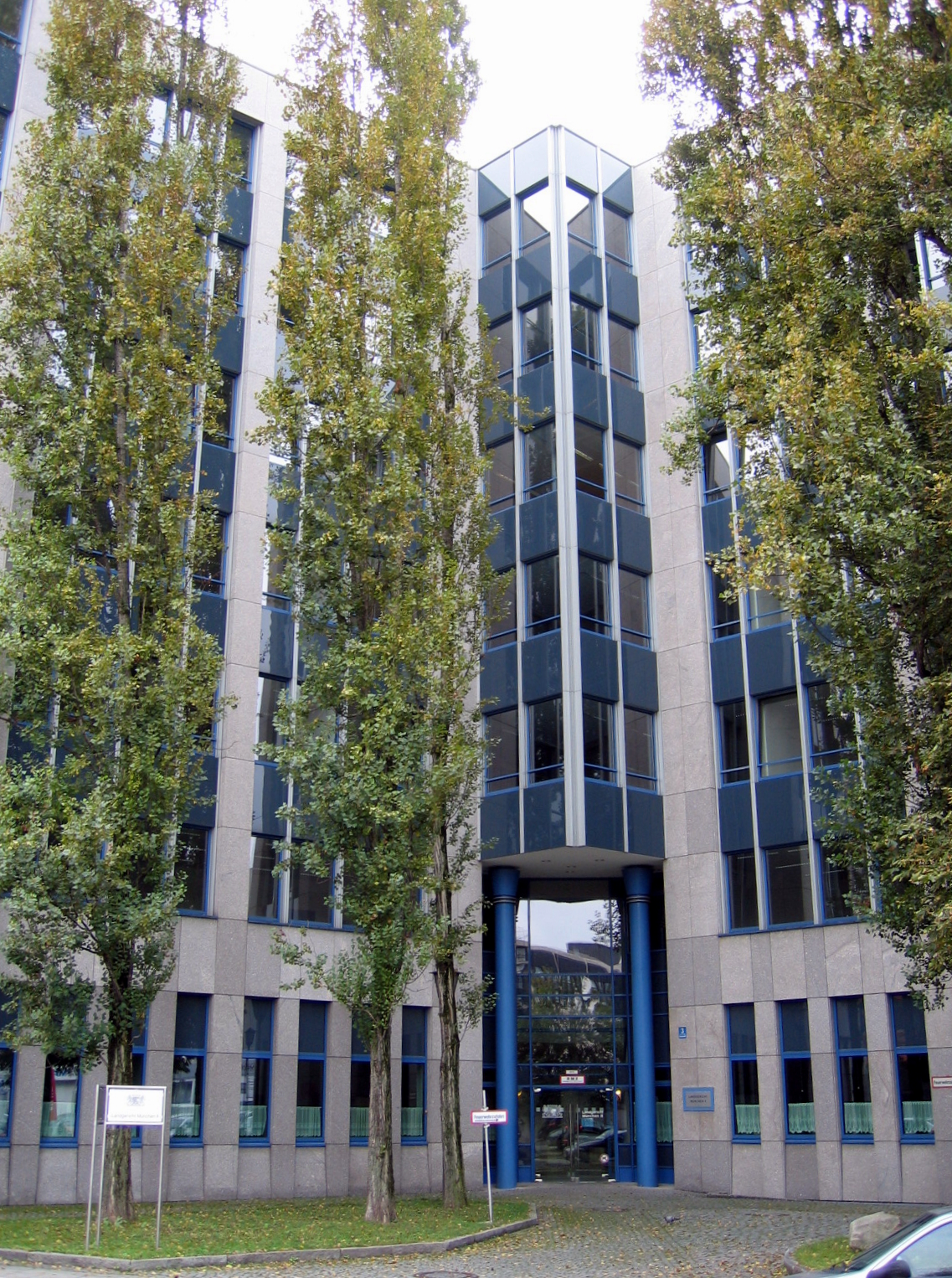 Description: Gebäude des Landgerichtes II, Denisstraße 3 in München (Germany) Source: selbst fotografiert Date: 14. Sept. 2005 Author: Bubo